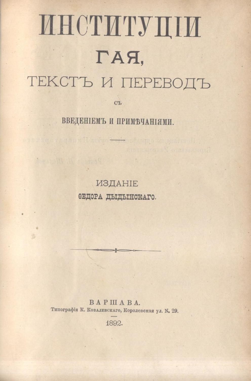 Институции Гая